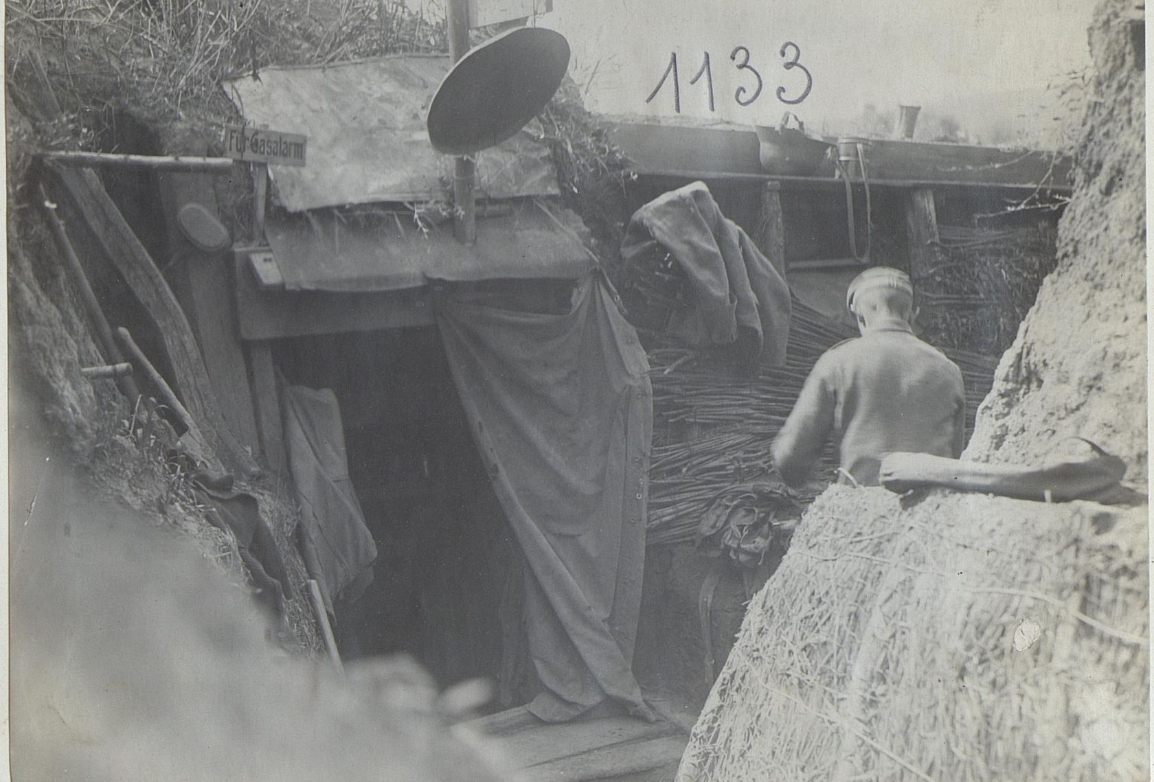 Szene im Schützengraben an der Narajowka (R.I.R.250) beim Verlassen gelegentlich der Offensive Juli 1917